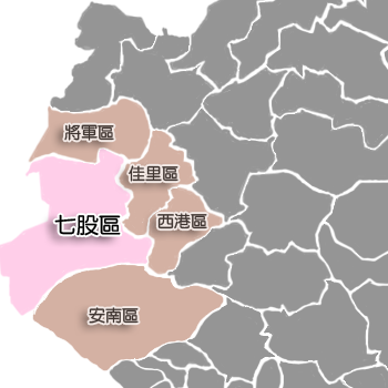 七股區相對位置